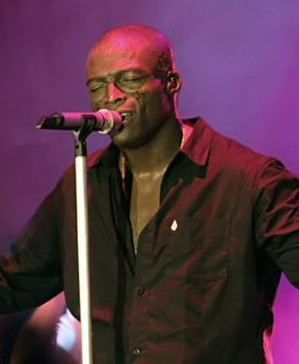 Seal aufgenommen in Frankfurt am Main.